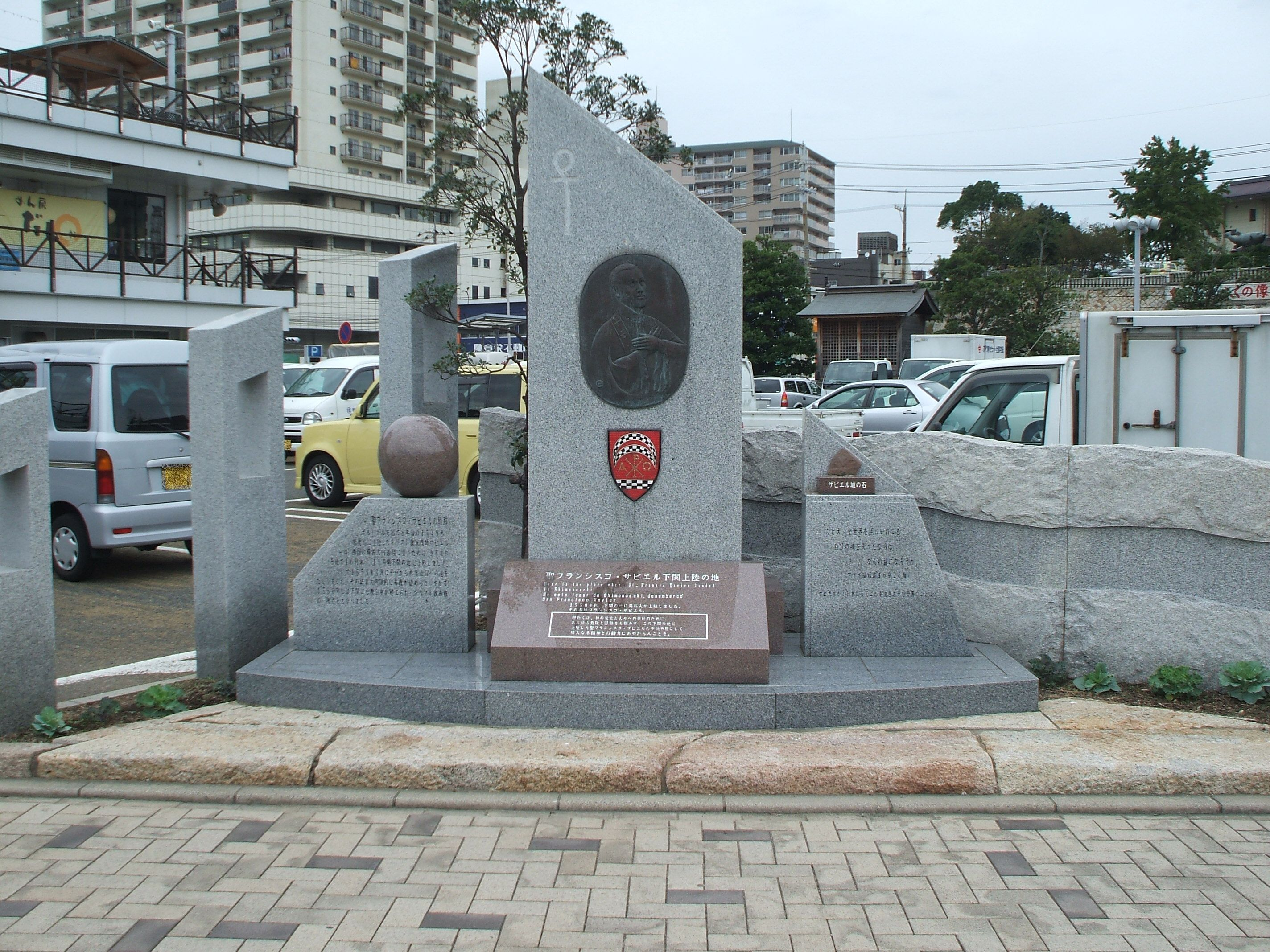 山口県ja:下関市のja:唐戸市場そばにある「聖ja:フランシスコ・ザビエル下関上陸の地」の碑